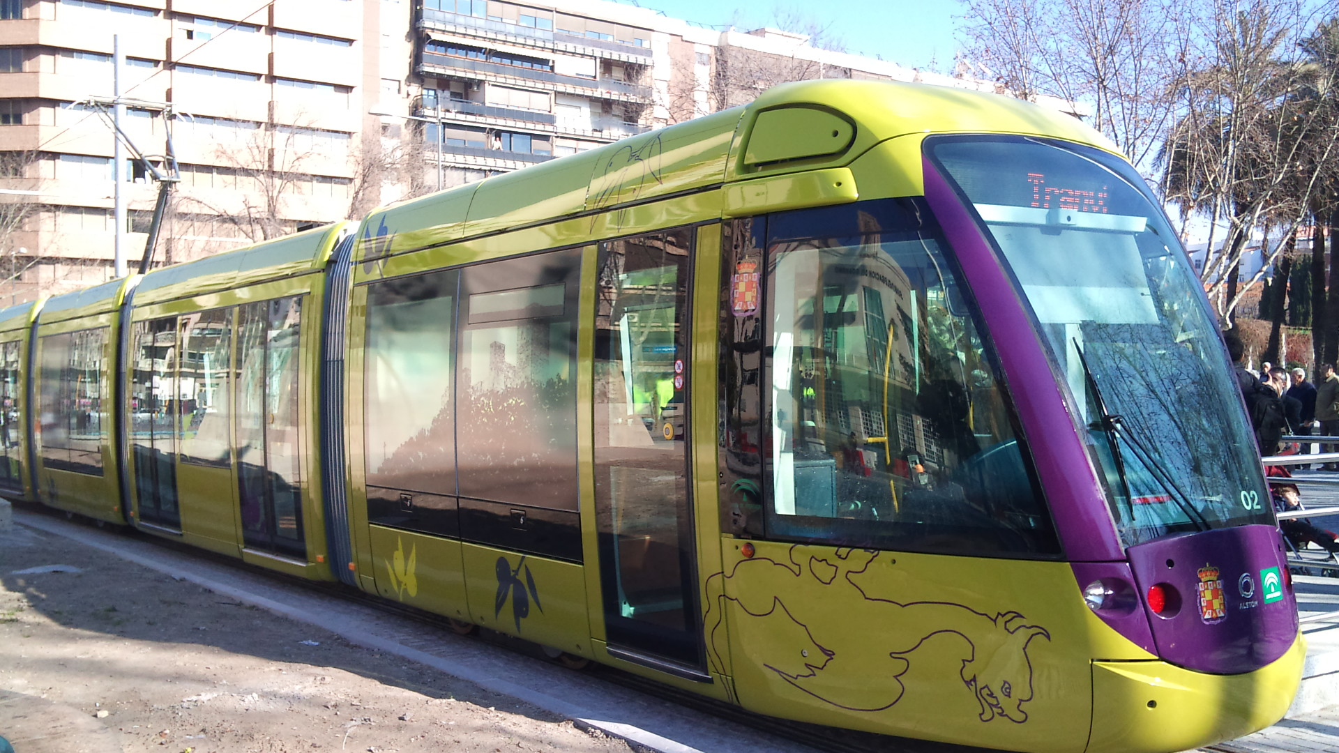 Vista del tranvía de Jaén en la parada de Las Batallas durante su primera prueba.